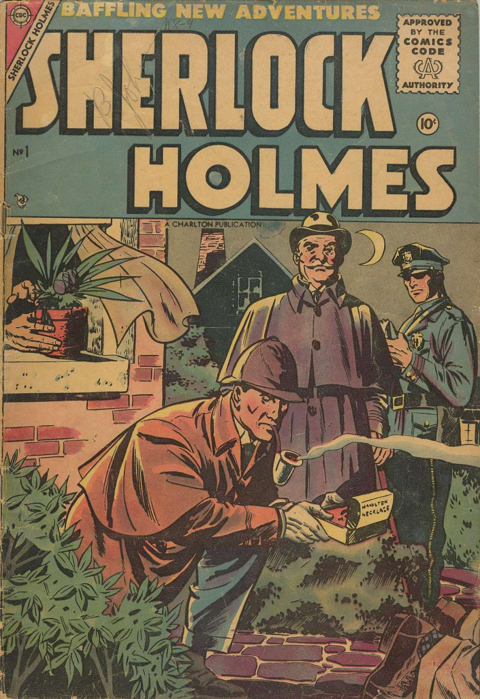 Capa de Sherlock Holmes #1, outubro de 1955, Charlton Comics